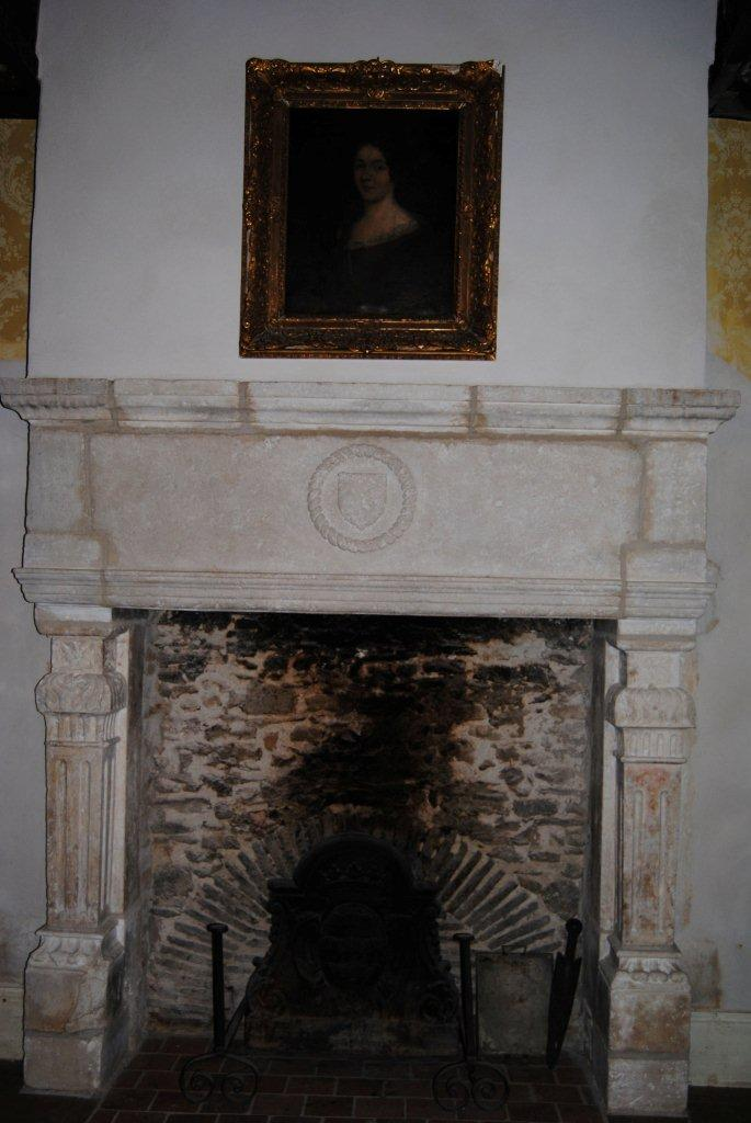 Cheminée du séjour dans le château de Montchoisy sur la commune de Chezelle dans l'Allier.